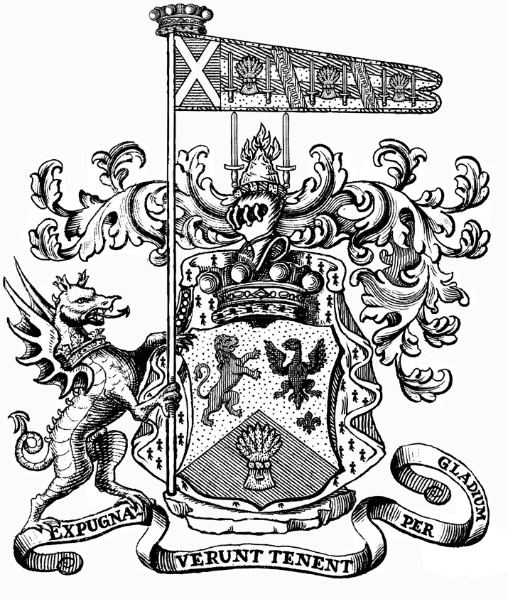 Schottischer Zweig der Echlin